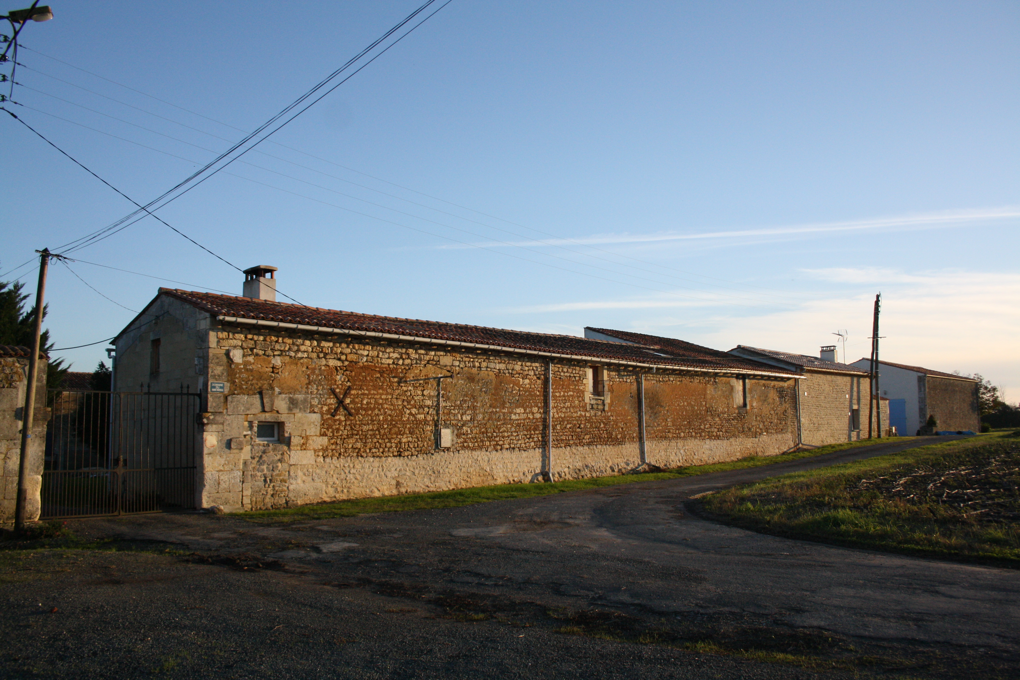 Logis de Maine Moreau, commune de Annepont, France.